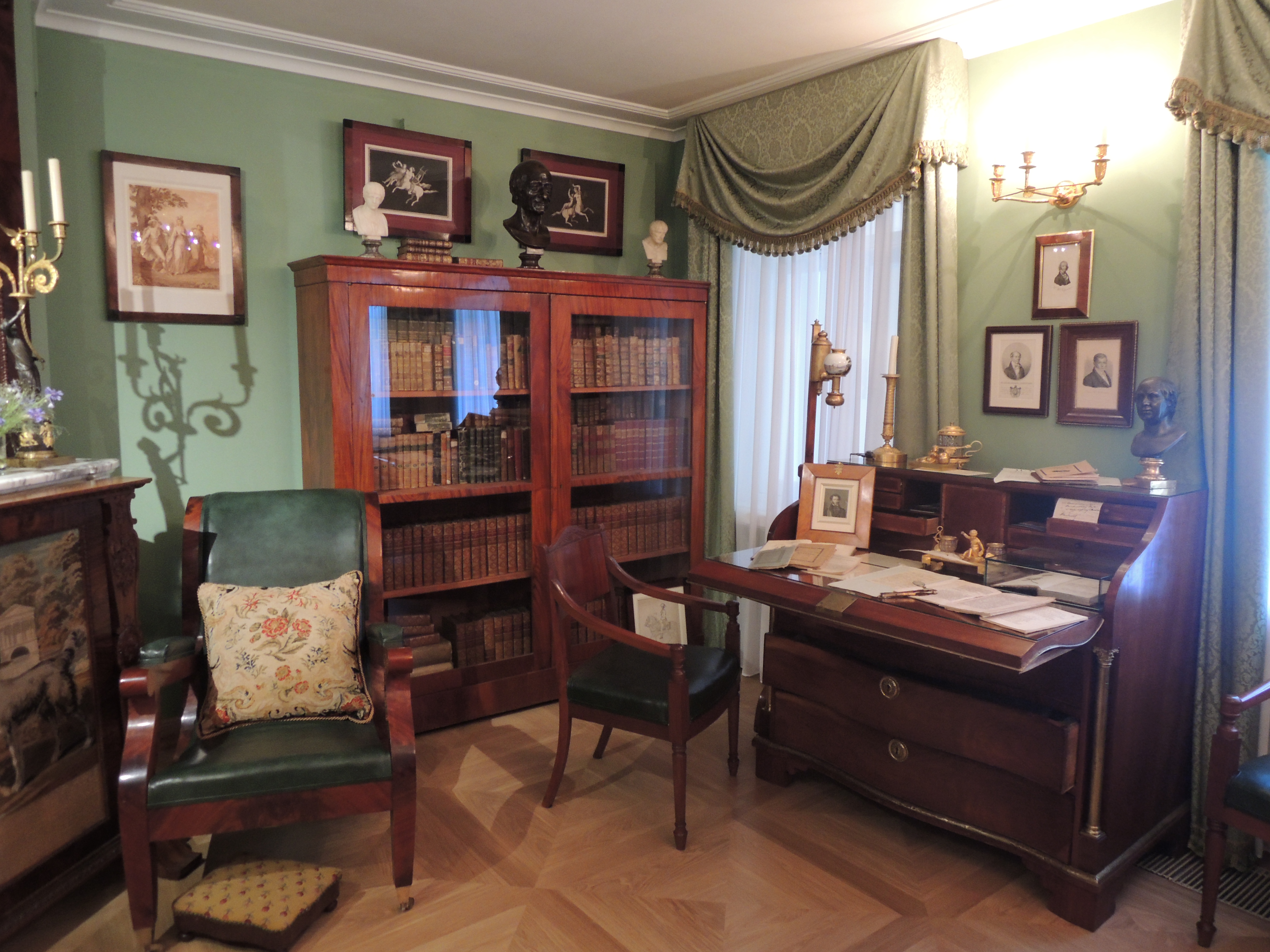 Дом-музей В. Л. Пушкина (филиал Государственного музея А. С. Пушкина) в день открытия 6 июня 2013 после масштабной реконструкции